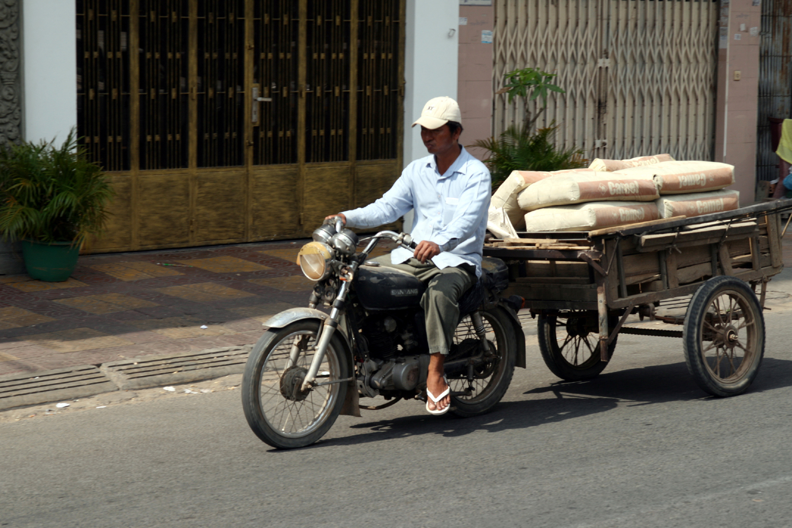 Phnom Pen, cycle